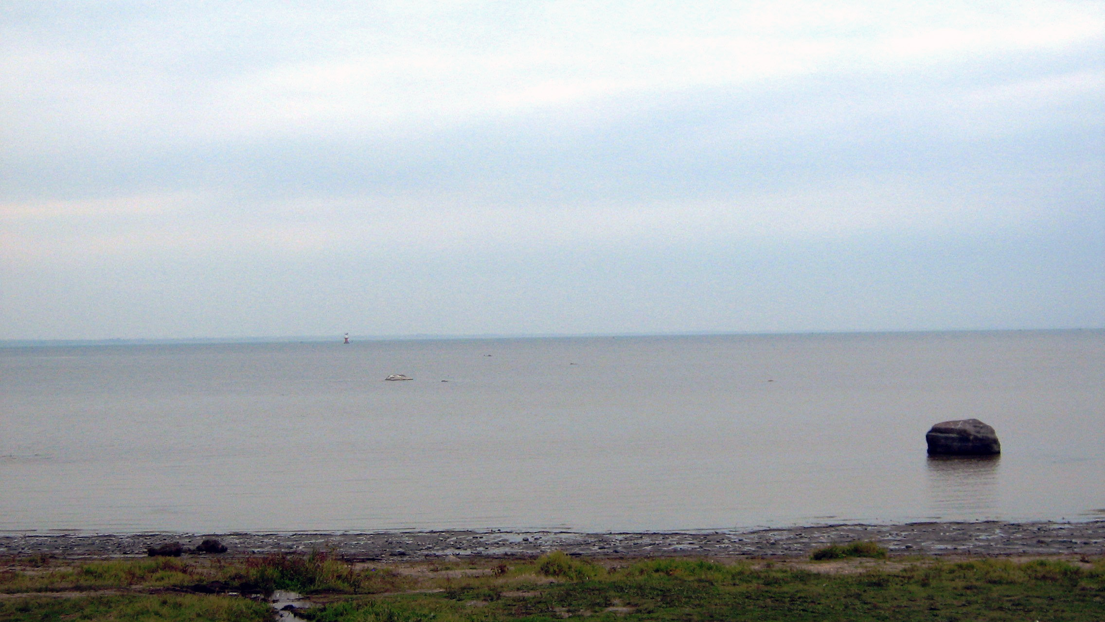 Lac Saint-Pierre vue de Pointe-du-Lac au Canada (Québec)